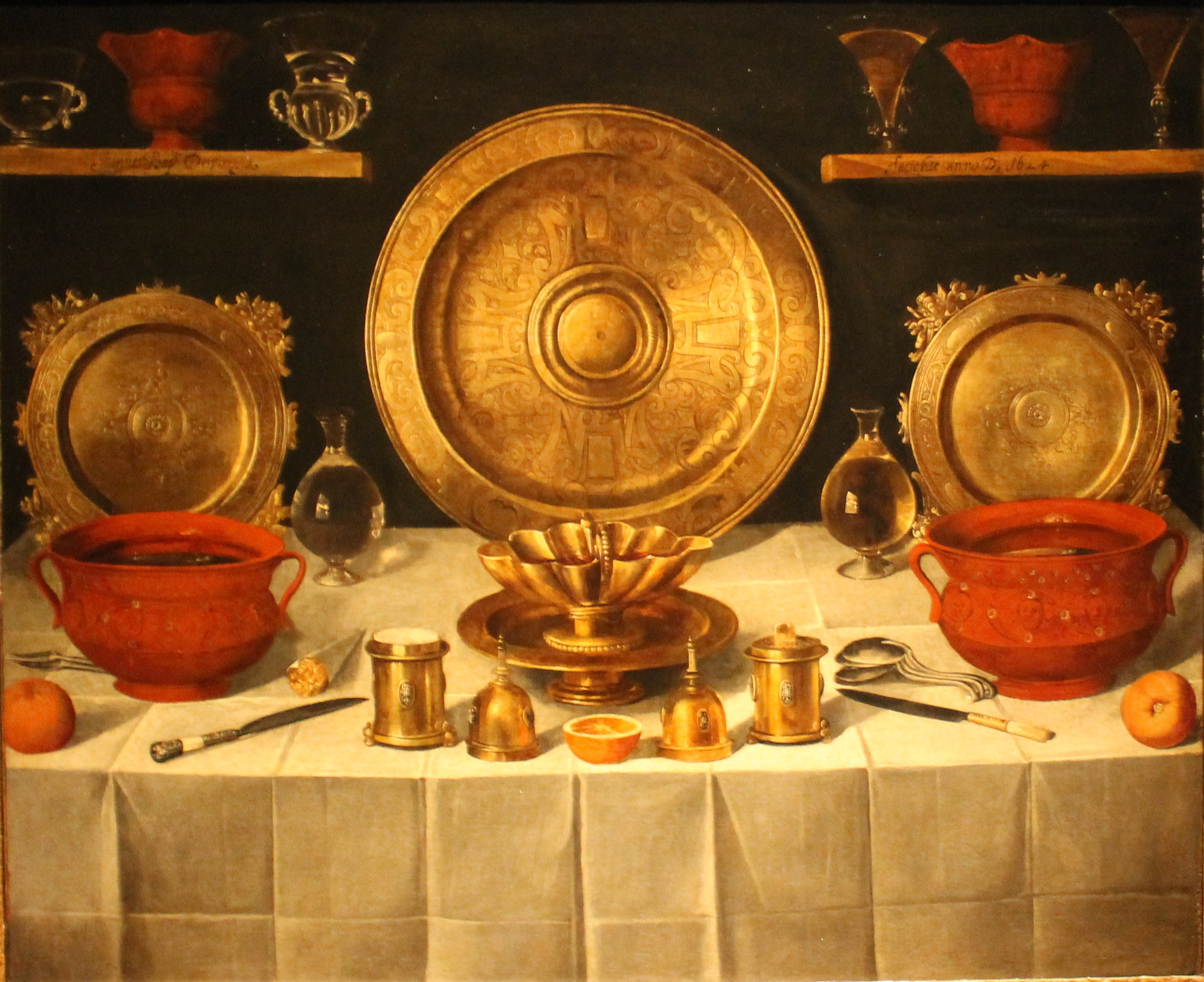 Naturaleza muerta con objetos de orfebrería. Óleo sobre tela firmado en 1624 por Juan Bautista de Espinosa.